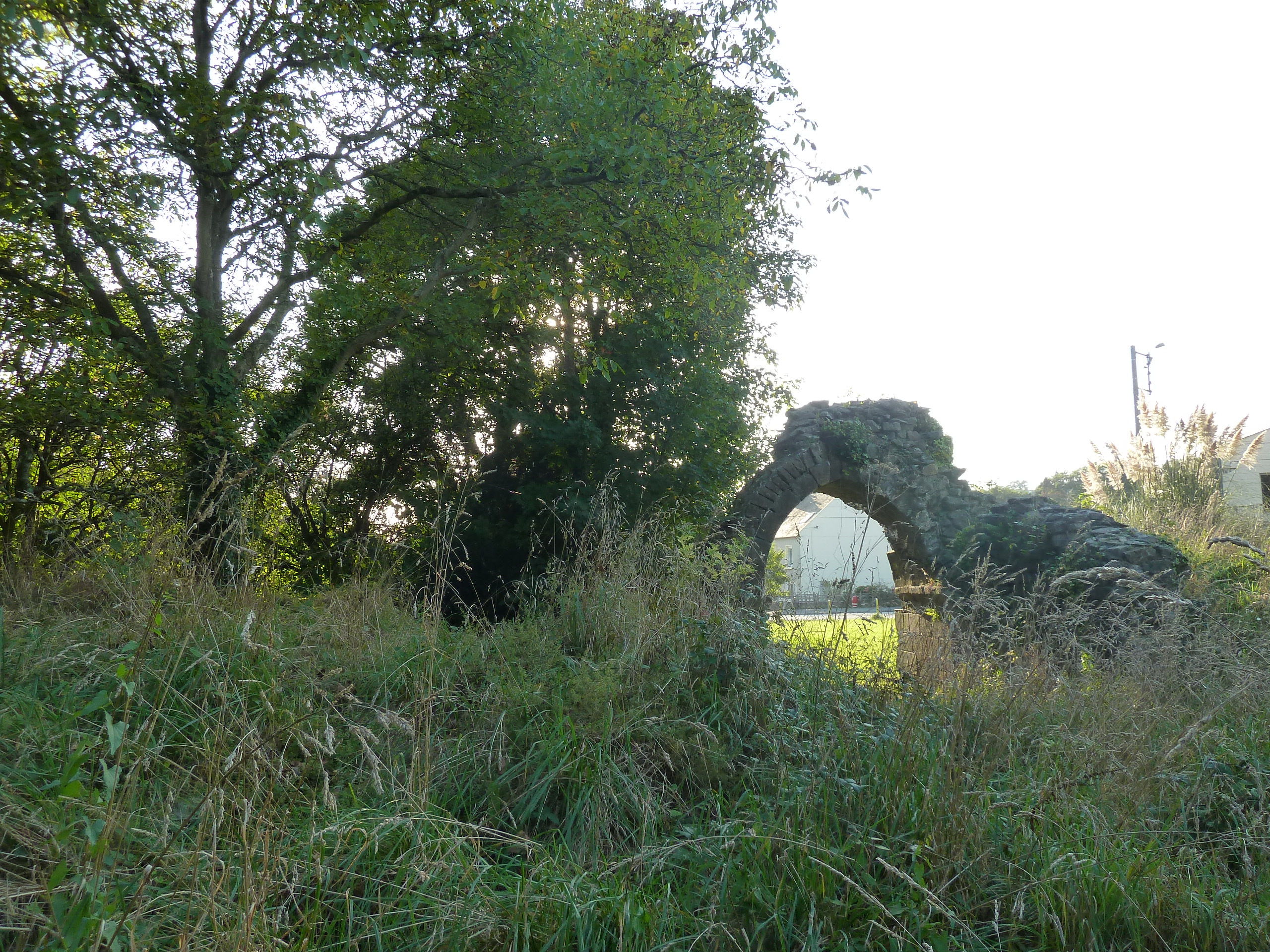 Château de Joyeuse Garde à La Forest-Landerneau